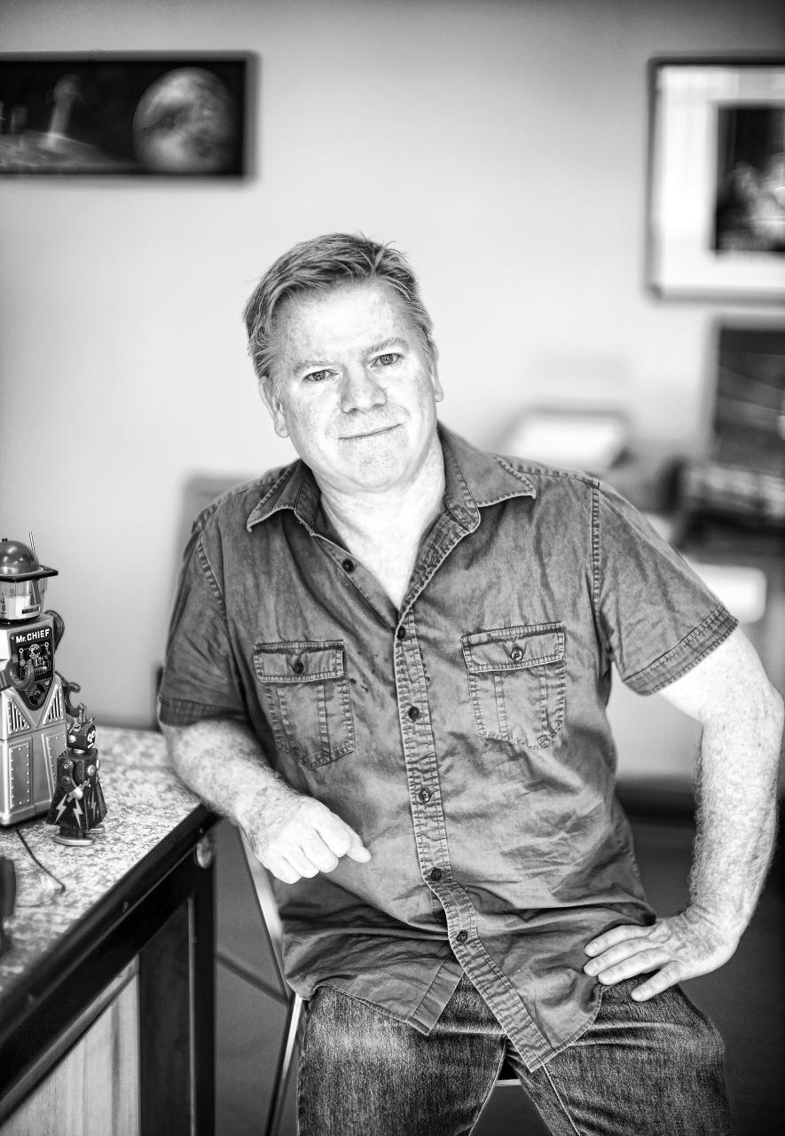 Eric Joyner